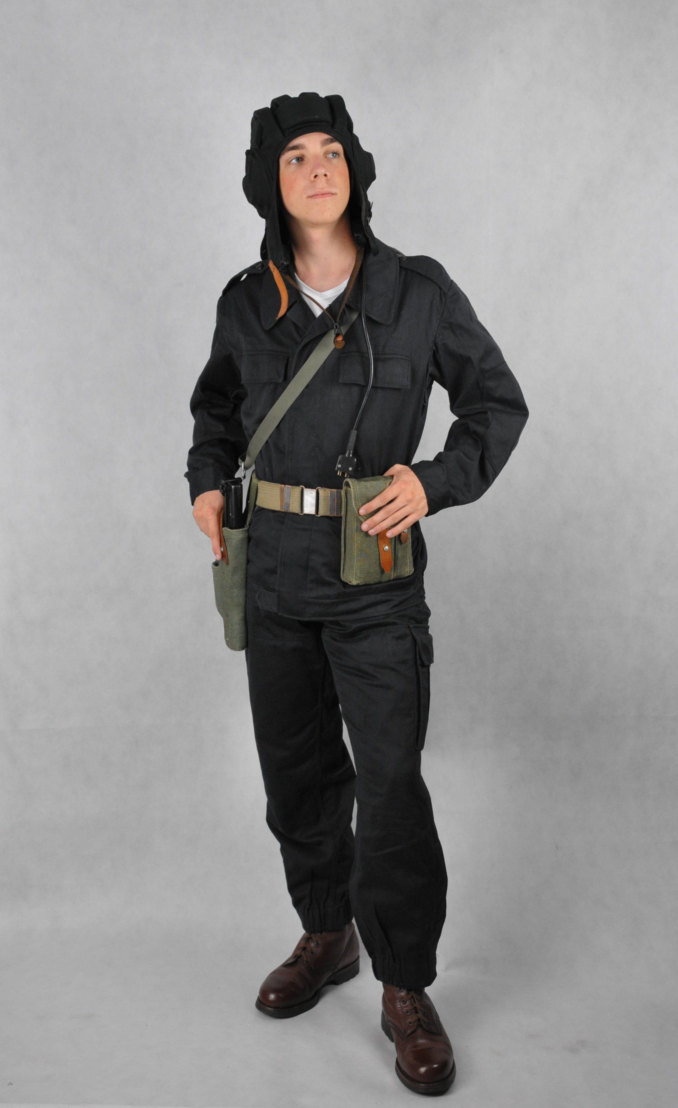 Czołgista w umundurowania wz.5682 z pistoletem maszynowym wz.1963 "Rak" i dedykowaną ładownicą.